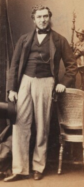 Douglas Labalmondière, by Camille Silvy.